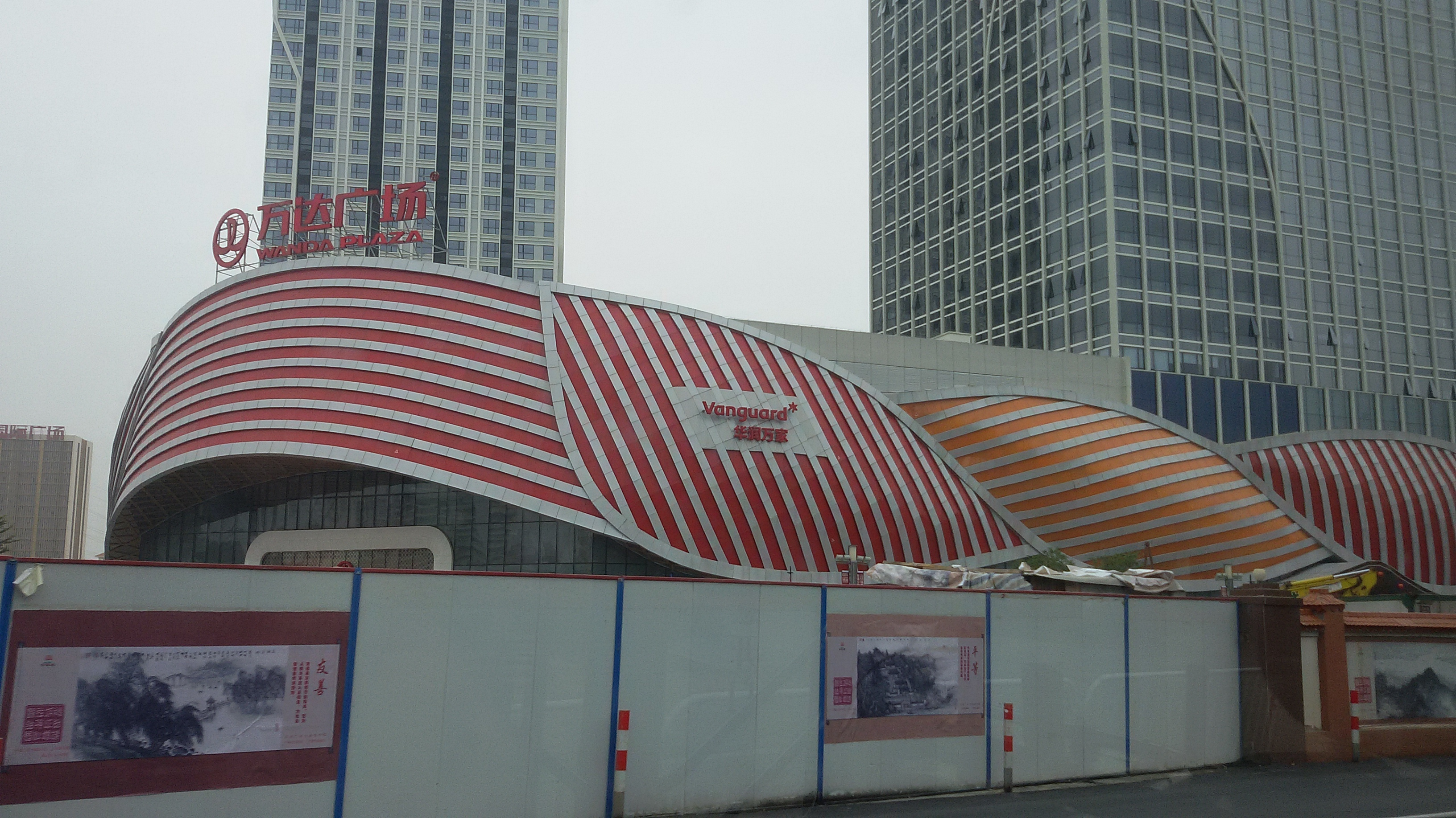 粵語: 萝岗万达广场正门附近，嗰时广州地铁6号线喺度起紧。